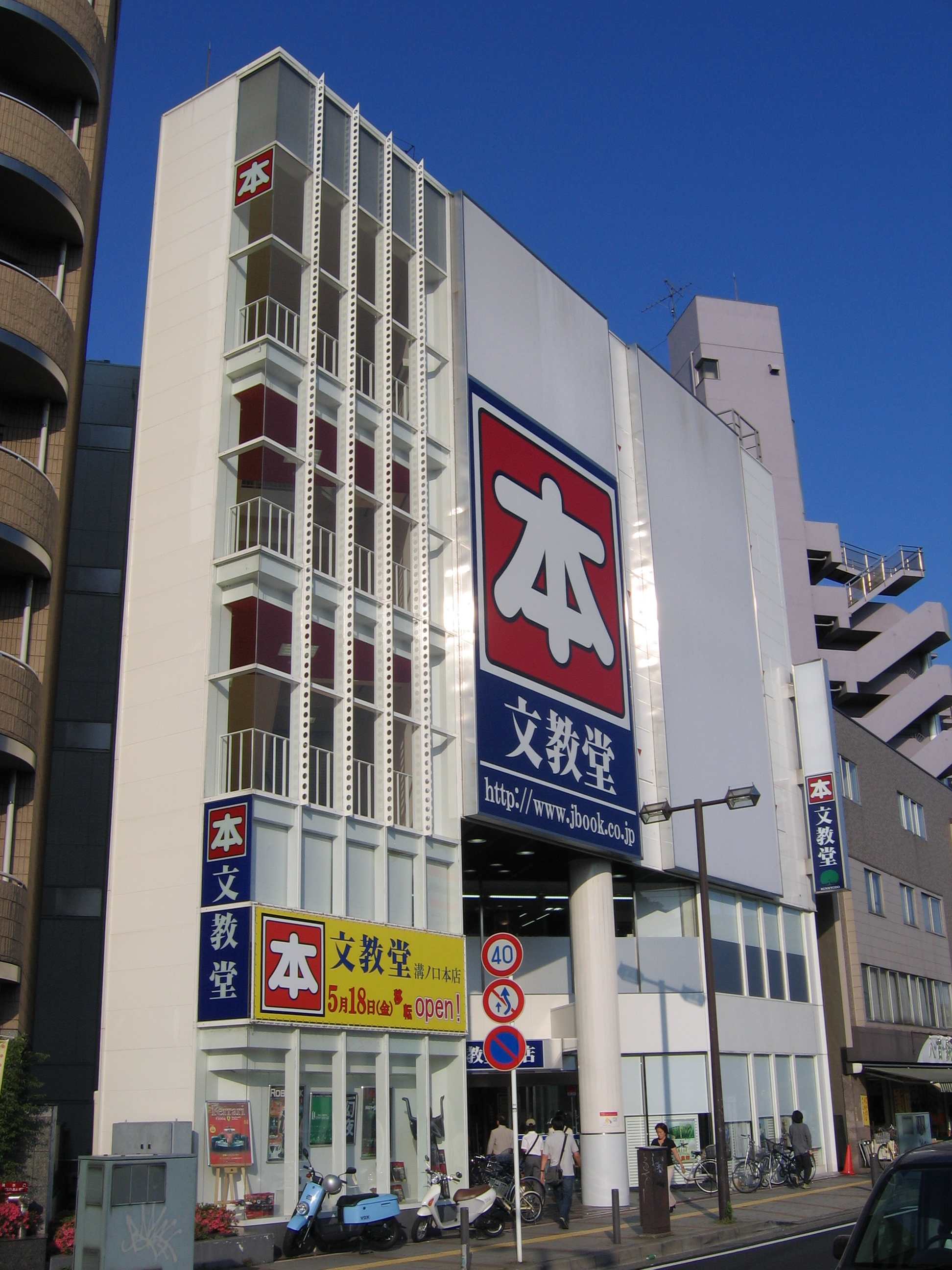 Bunkyodo Mizonokuchi Home Store, Kawasaki, Kanagawa, Japan